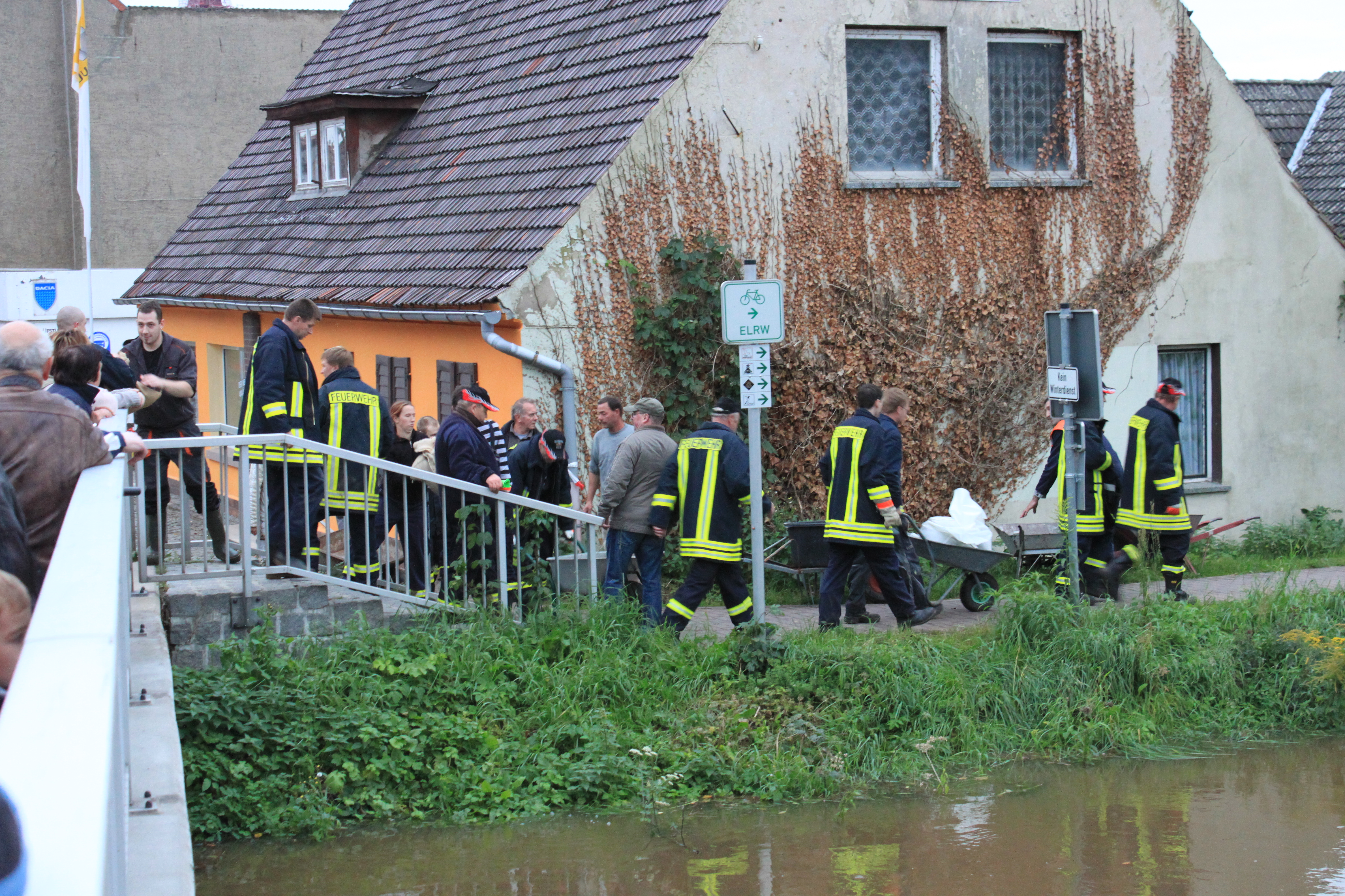 Hochwasser der Schwarzen Elster in Bad Liebenwerda.